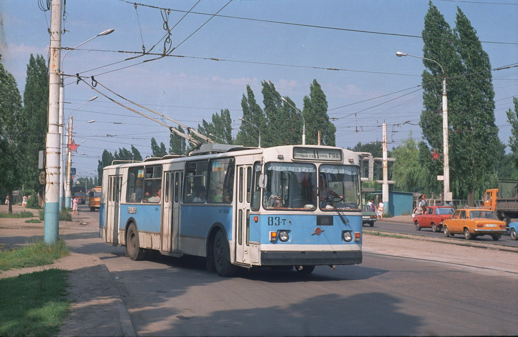 Троллейбус выезжает с к/ст "Северо-Восточный район"